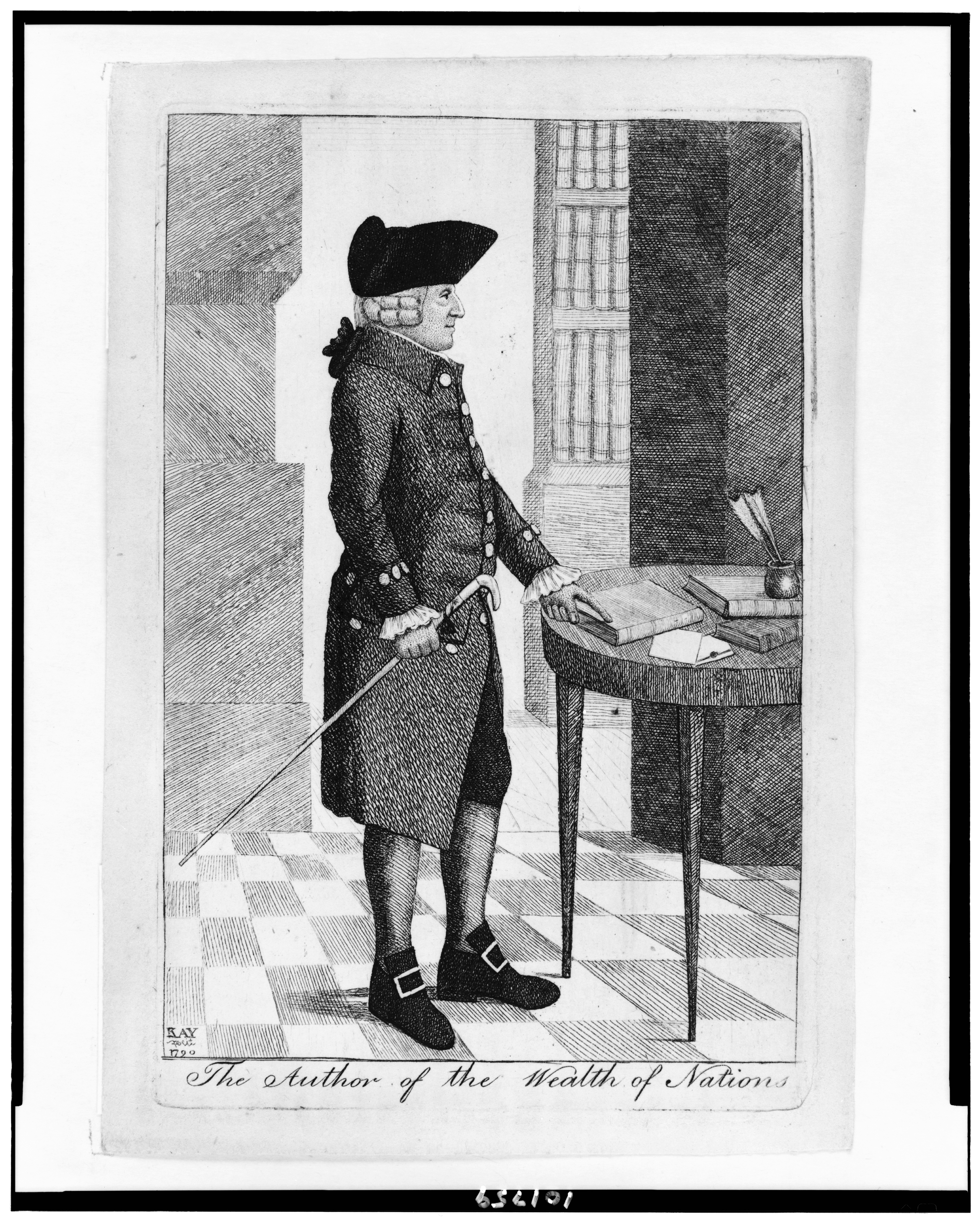 Adam Smith; engraving